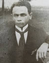 Augusto Helano Cardoso